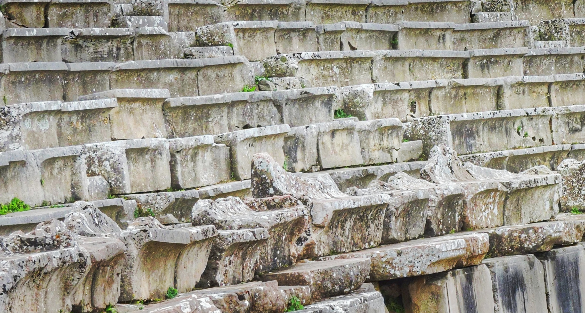 Αρχαίο θέατρο Ασκληπιείου Επιδαύρου«Αρχαίο θέατρο Ασκληπιείου Επιδαύρου»